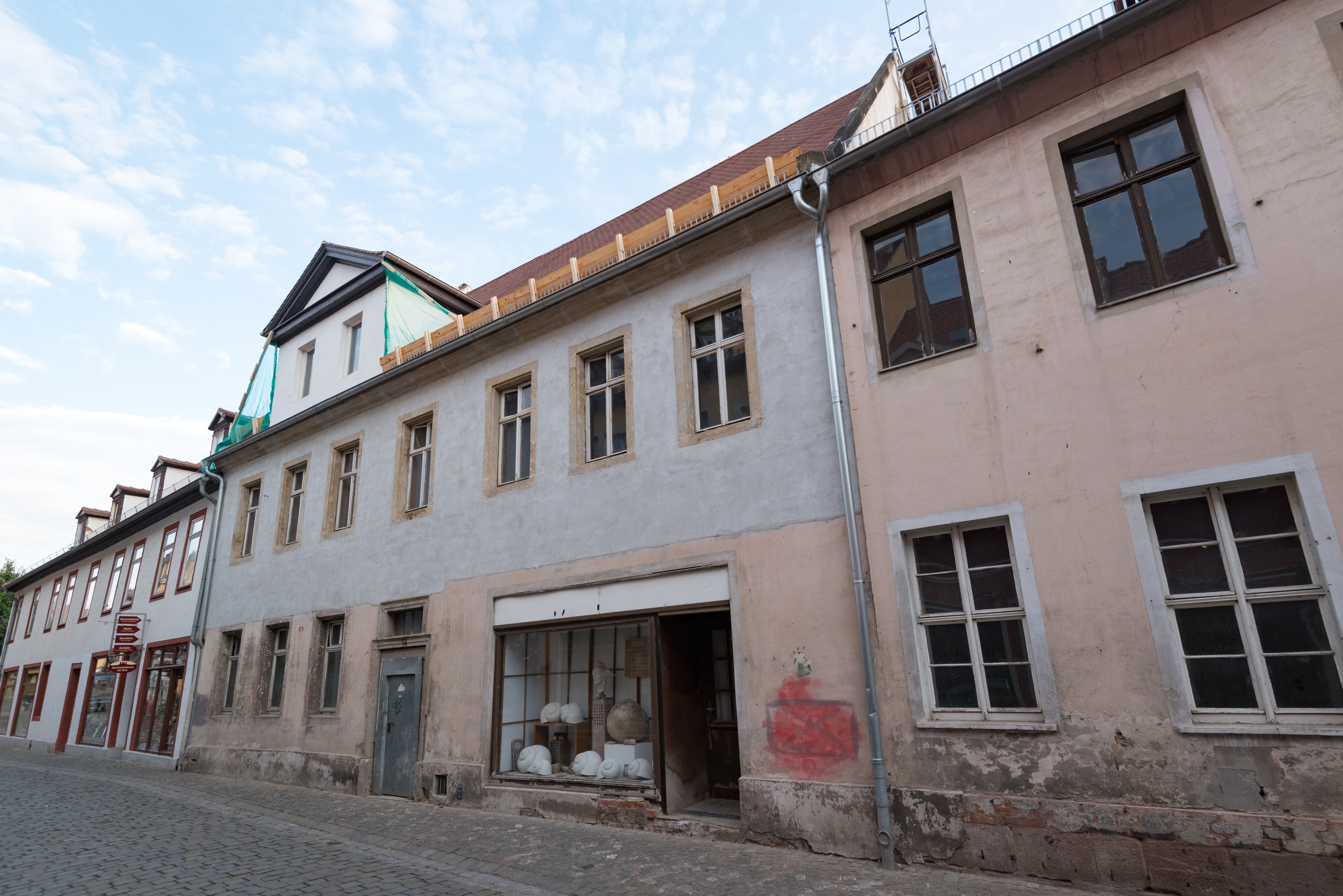 Naumburg (Saale), Steinweg 18